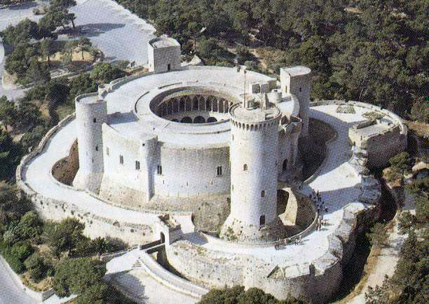 Castillo de Bellver, Palma de Mallorca, Islas Baleares, España.